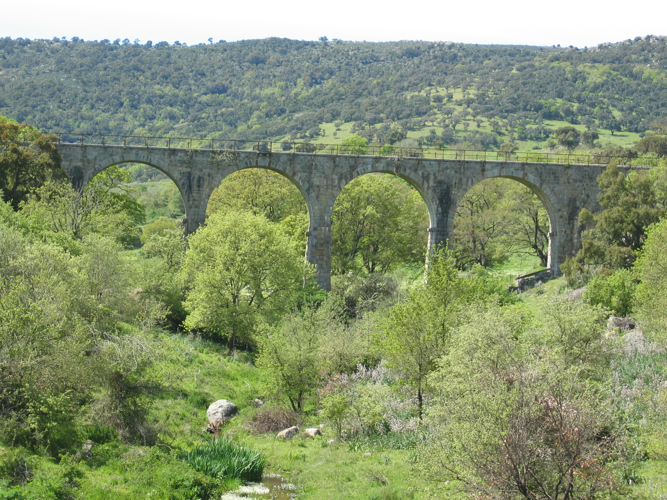 Foto scattata il 25.8.2008